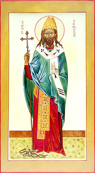 L'icône de St. Samson de Dol peinte pour l'Association orthodoxe sainte Anne (Bretagne).